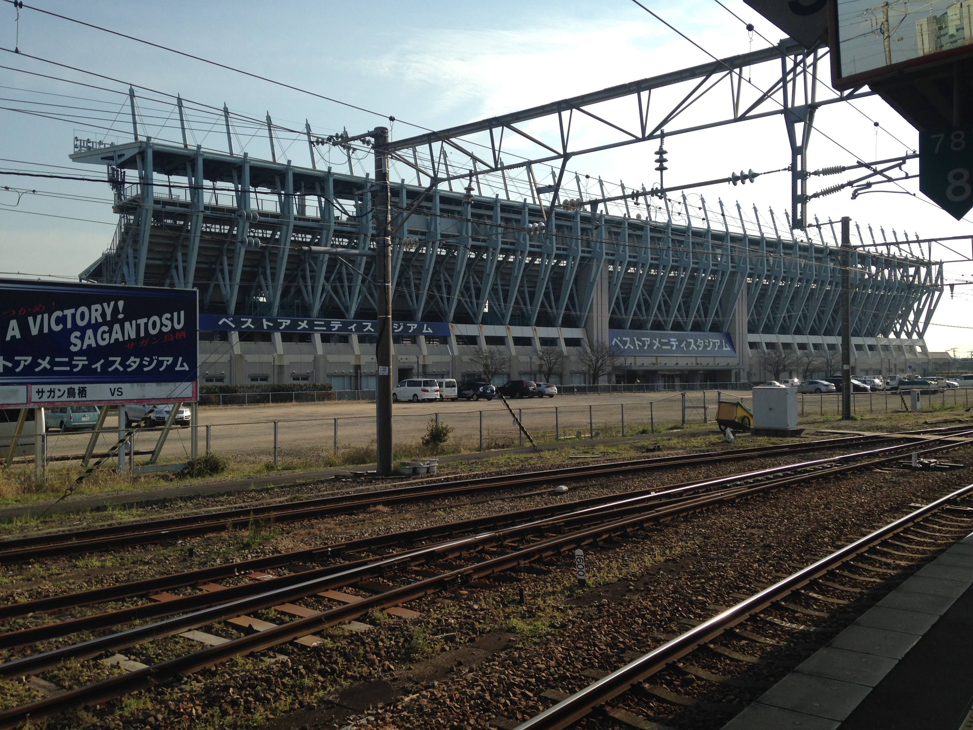 鳥栖駅より望む鳥栖スタジアム